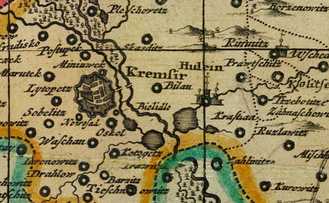 Bílany na Müllerově mapě Moravy (1790) - výřez z mapového listu 11